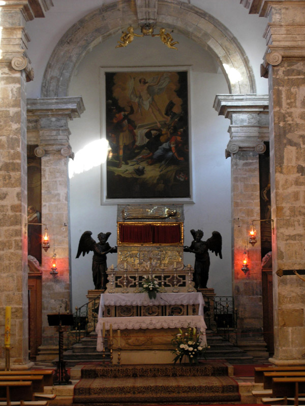 St. Simeon